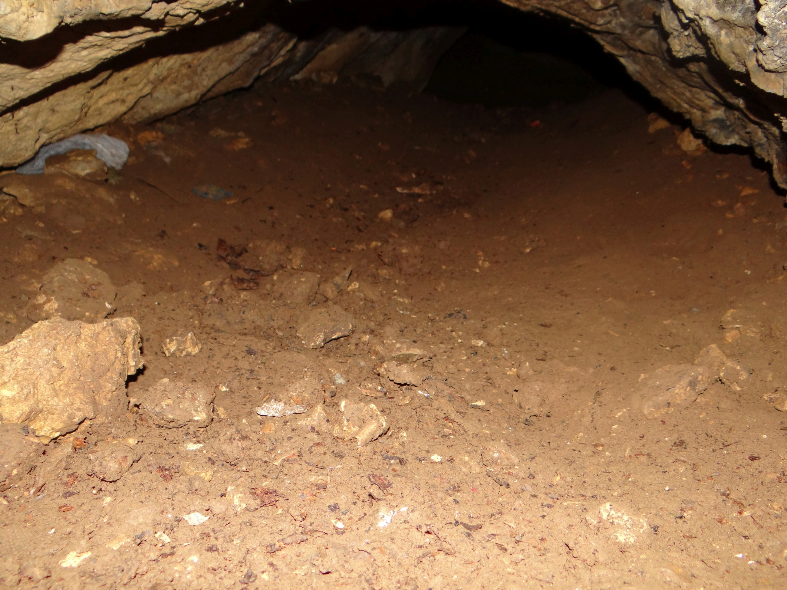 Jaskinia Gaudynowska